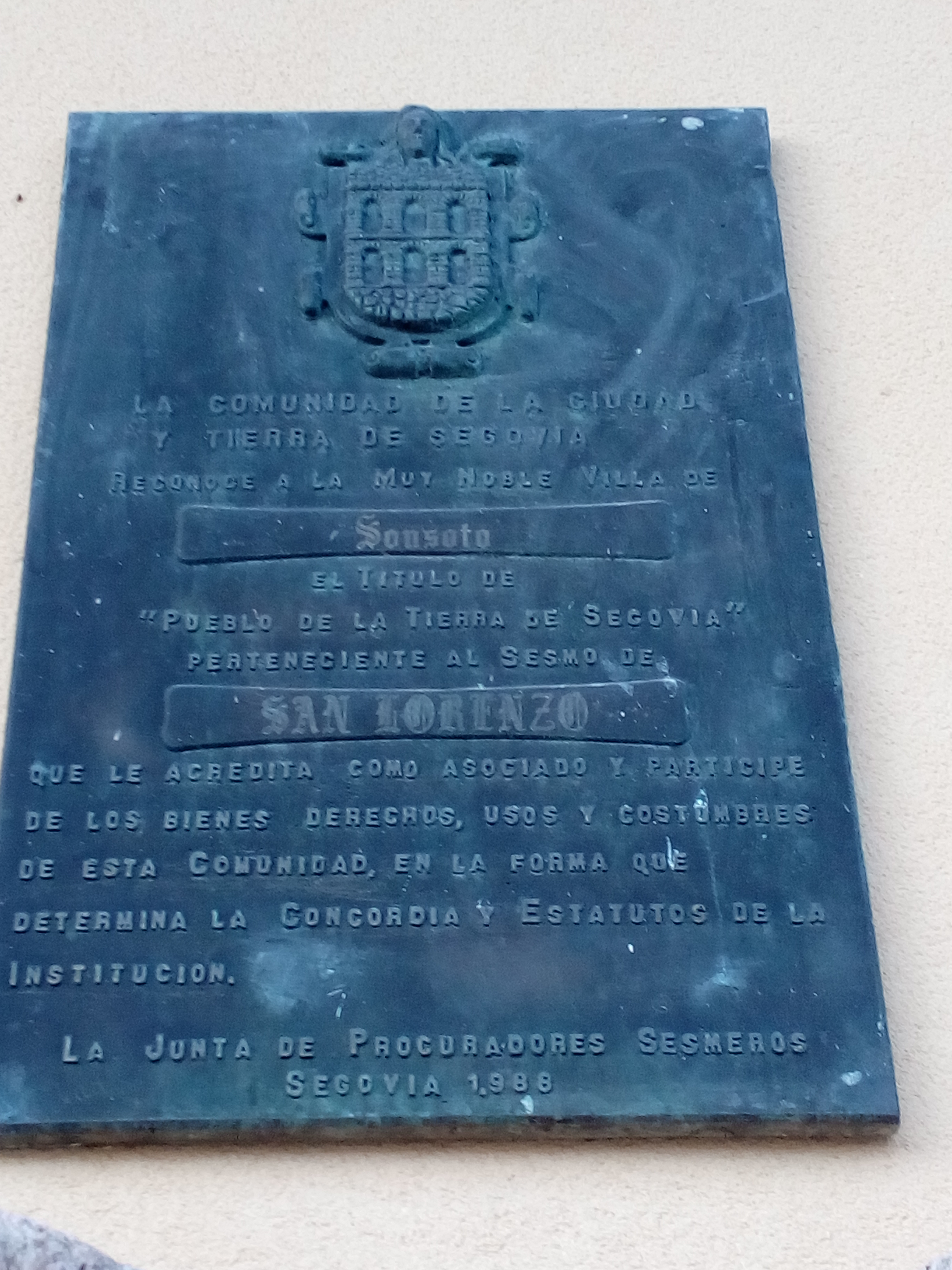 Documento en el que la localidad de San Lorenzo reconoce de muy noble villa a la localidad de Sonsoto.